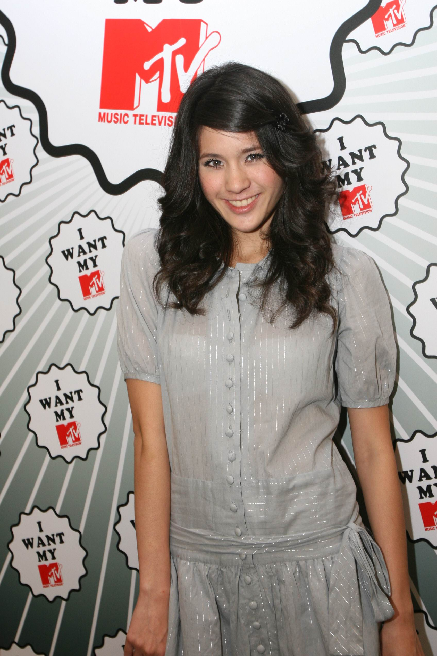 จิ๊บ ปกฉัตร เทียมชัย (Gyp ,Pokchat Thiamchai)